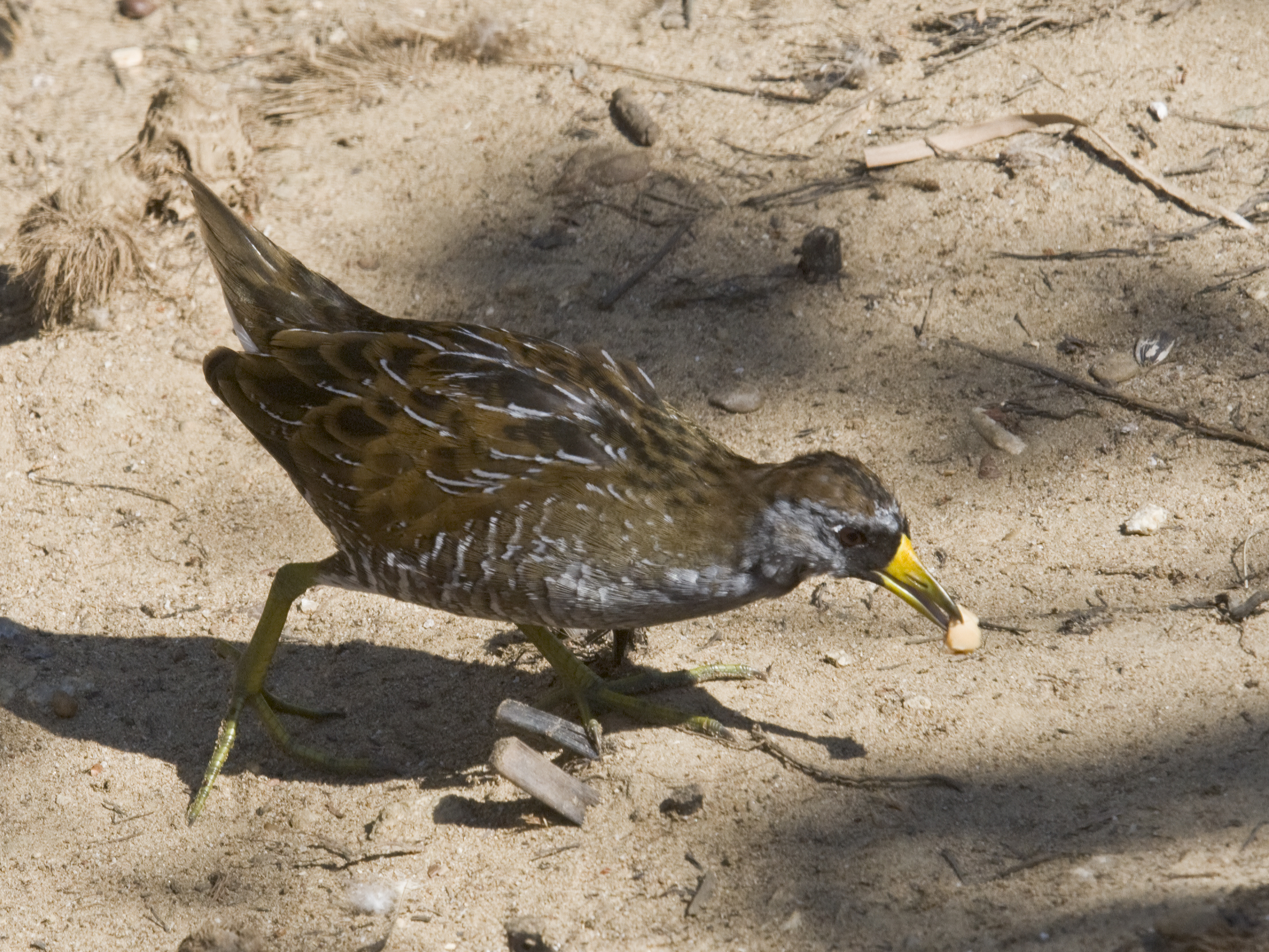 Marouette de Caroline (Porzana carolina)